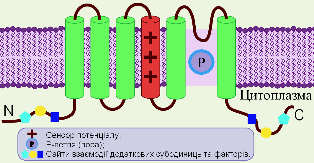 Схема потенціалзалежного іонного каналу. Власна робота, на основі Костюк П. Г., Зима В. Л., Магура Ш. С., Мірошниченко М. С., Шуба М. Ф. Біофізика. — К.: ВПЦ "Київський університет", 2008. — 567 с.